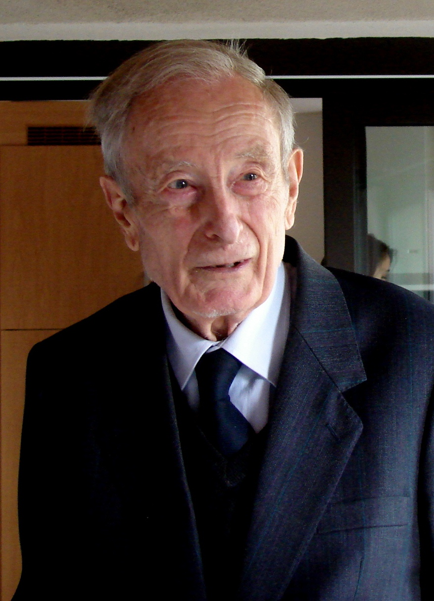 à l'anniversaire de ses 90 ans fêté en juin 2011 à Mercurey